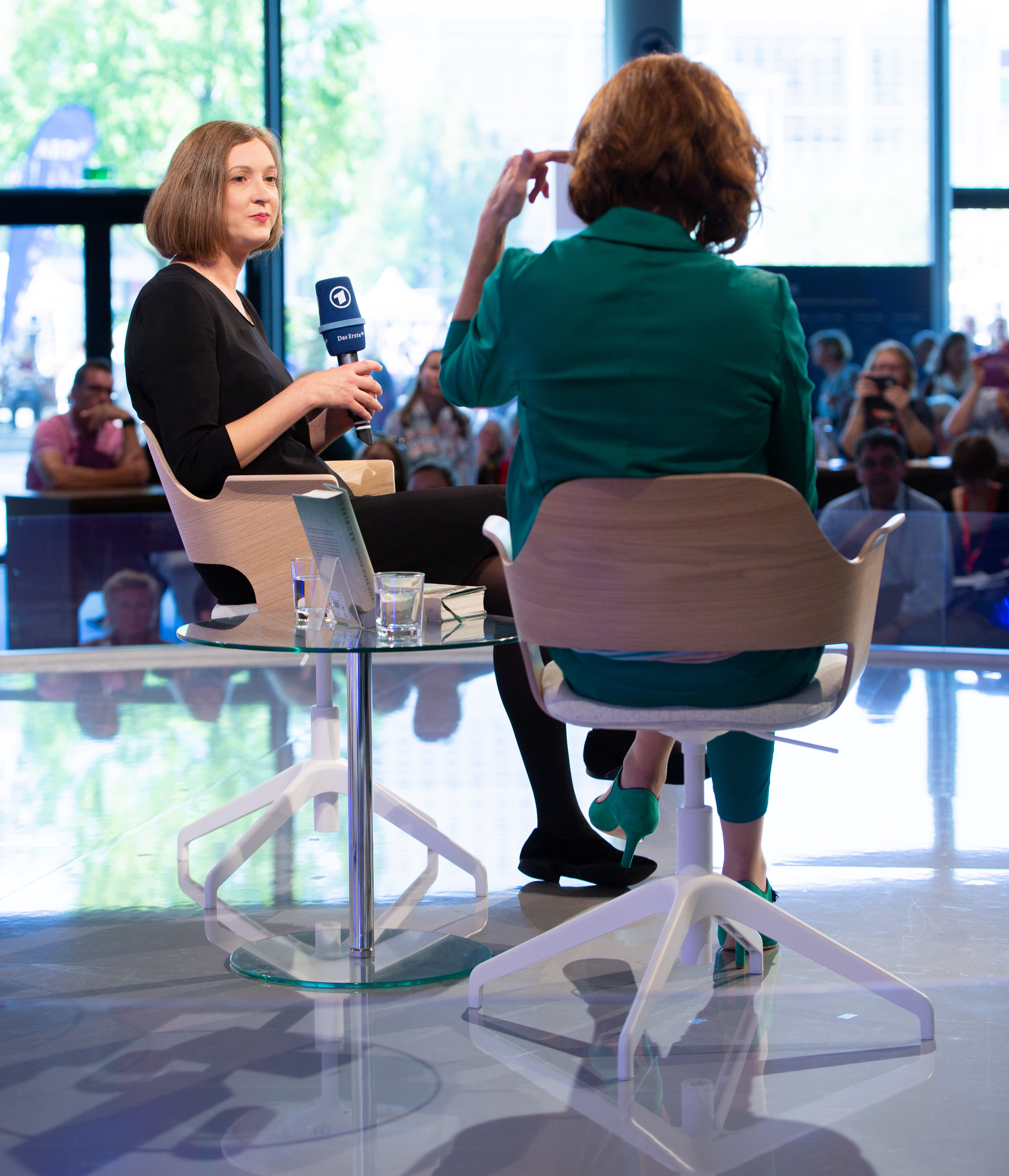 Buchpreisträgerin Inger-Maria Mahlke im Gespräch mit Cécile Schortmann auf der ARD-Bühne der Frankfurter Buchmesse 2018